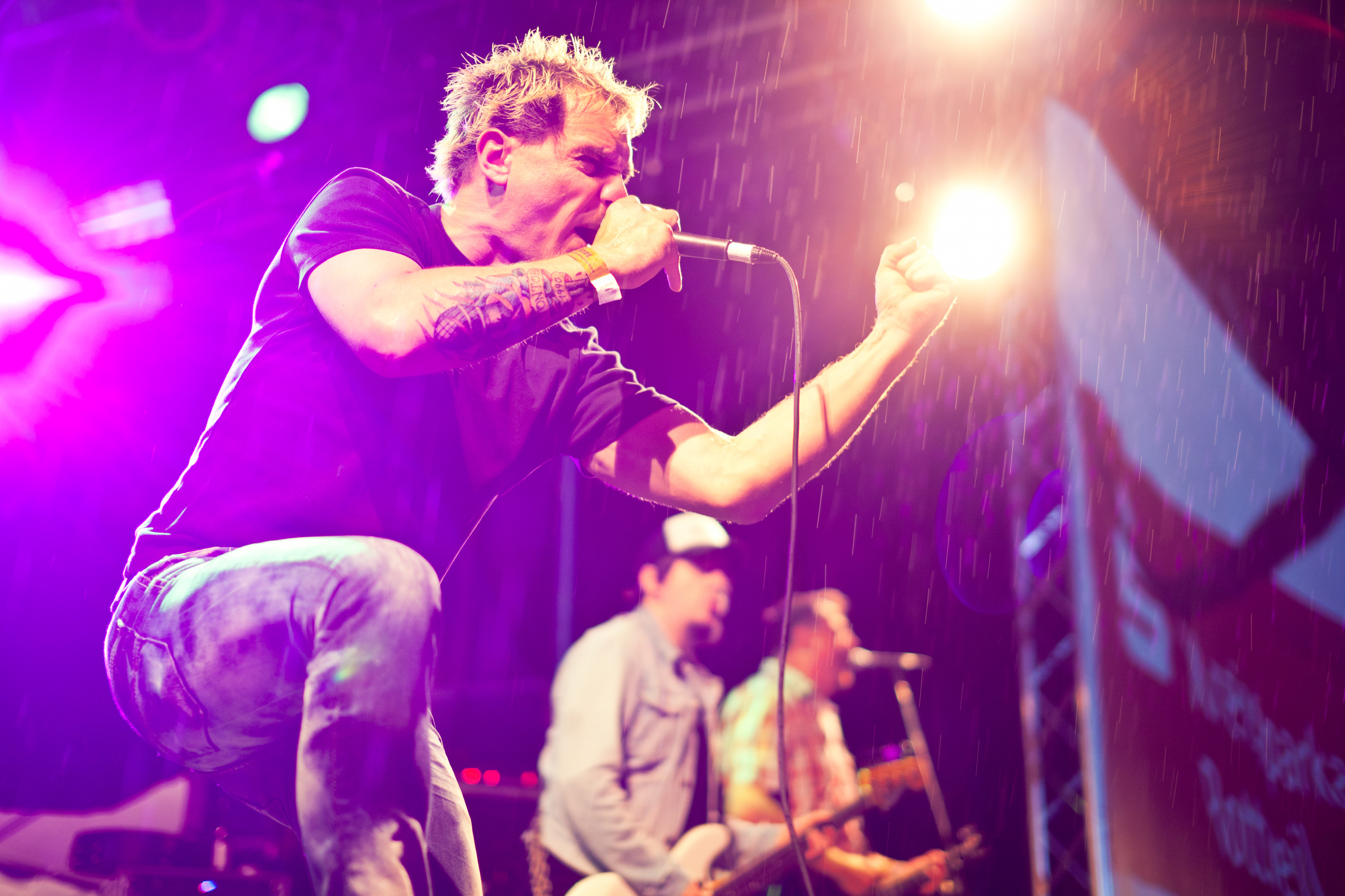 Oliver Meister von Betontod bei Rock am Neckar 2011